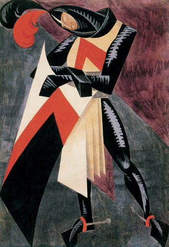 В.И. Мухина. Эскиз костюма Бертрана к драме . 1916.